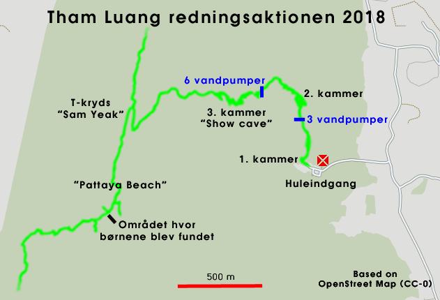 Tham Luang kort over redningsaktionen 2018